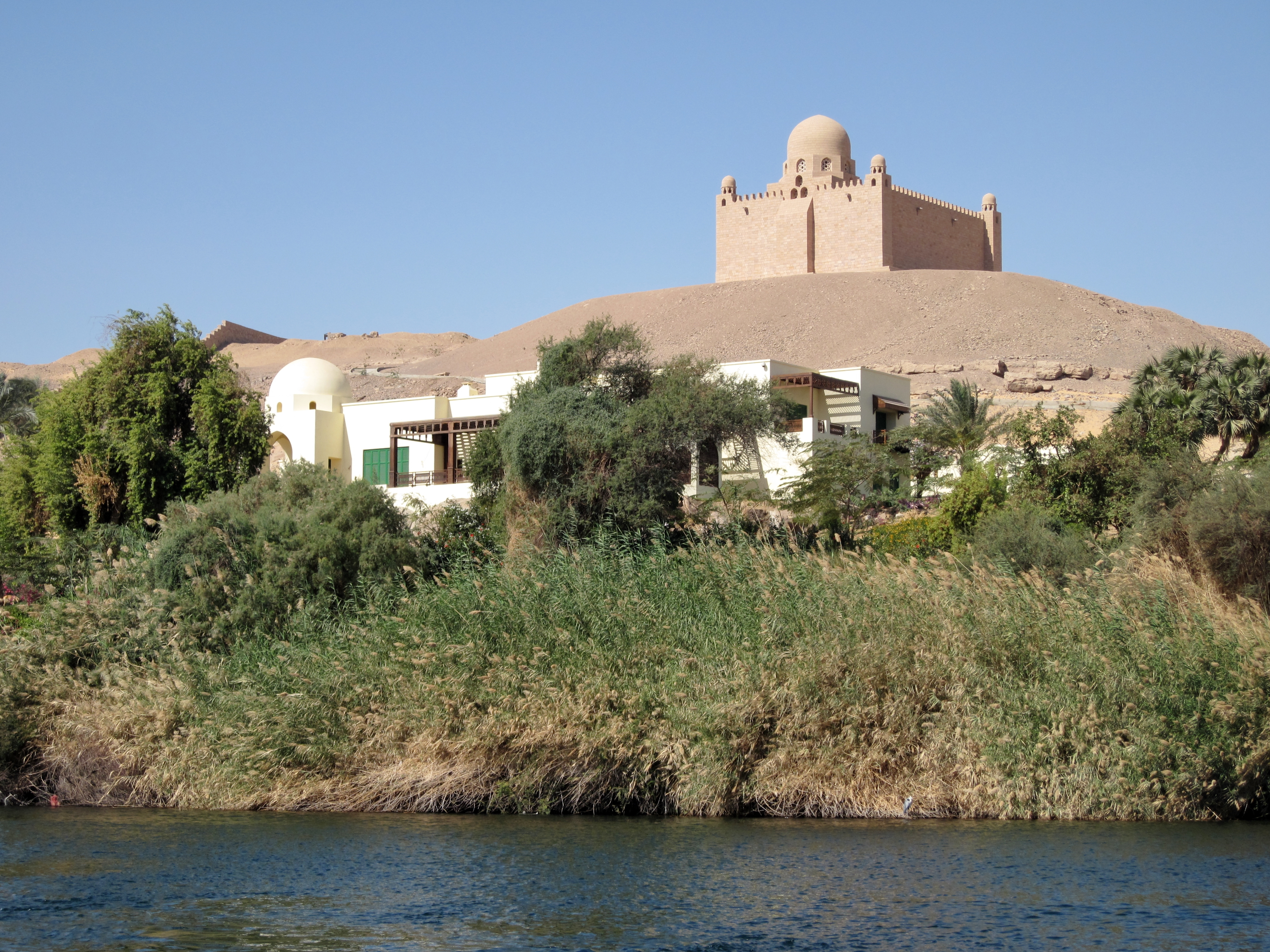 Mausoleum des Aga Khan III. in Assuan, Ägypten